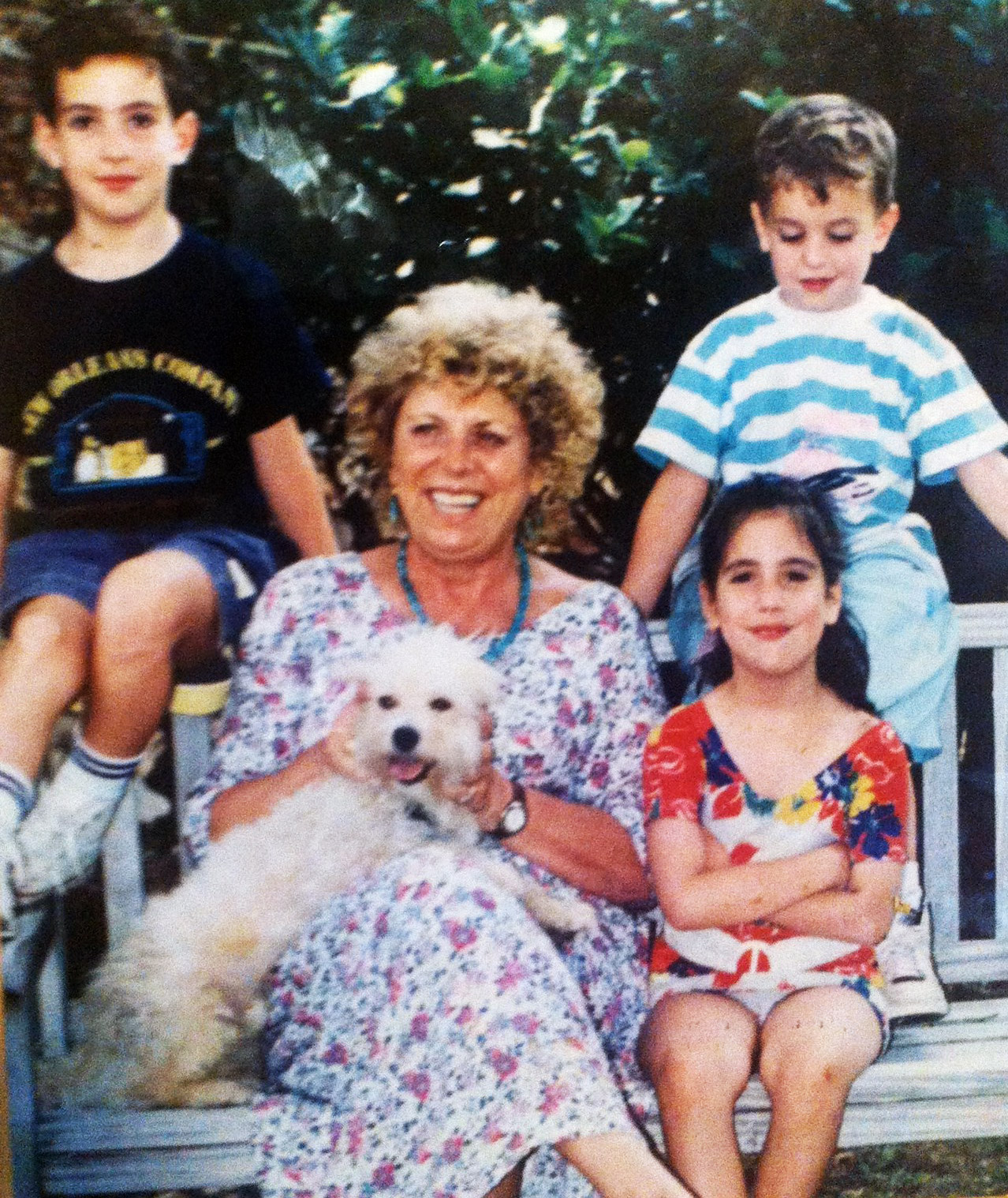 שולמית אלוני עם 3 מנכדיה